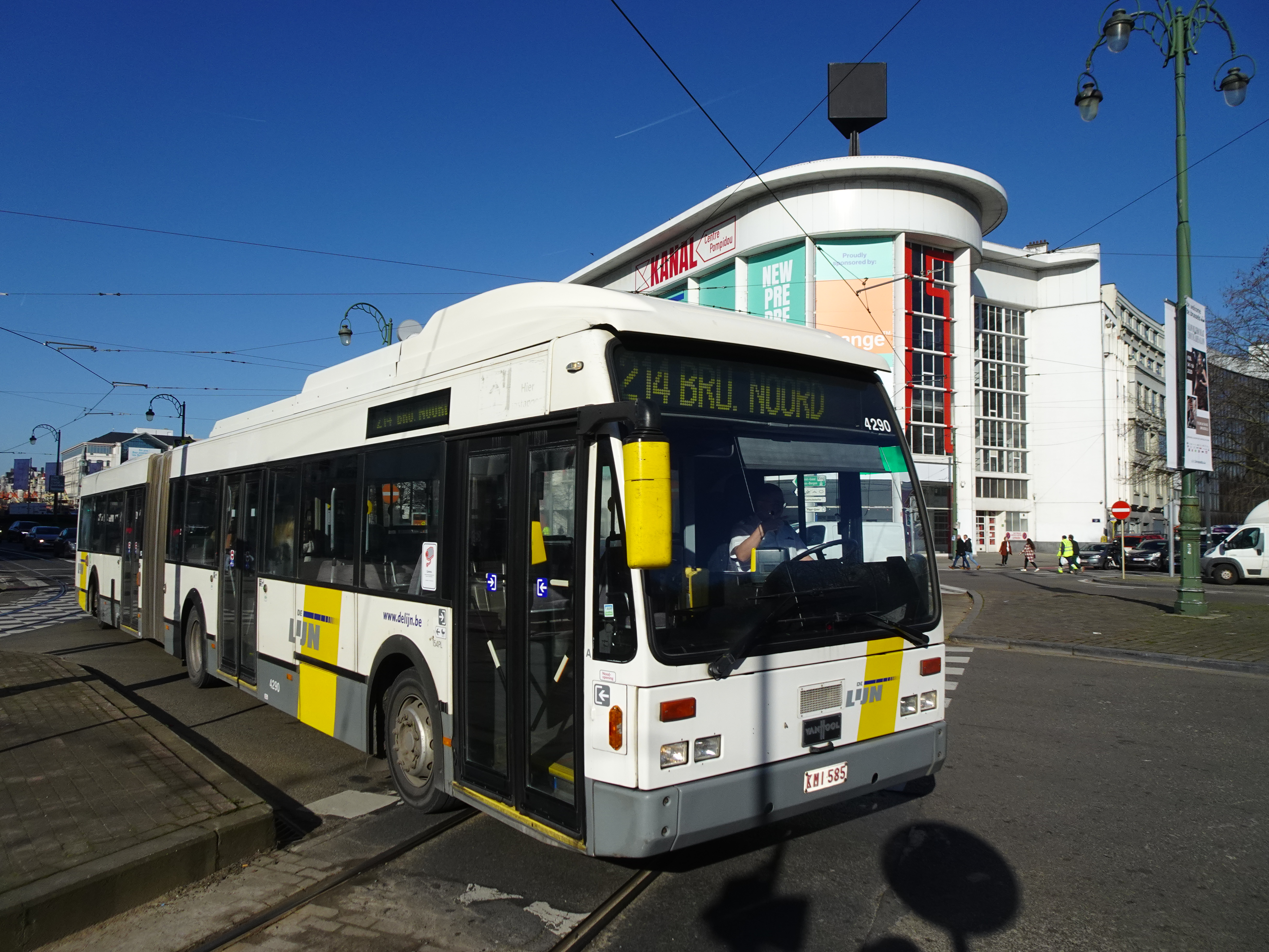 Van Hool AG500 (avec filtre à particules sur le toit) assurant la ligne 214 (Alost - Bruxelles).